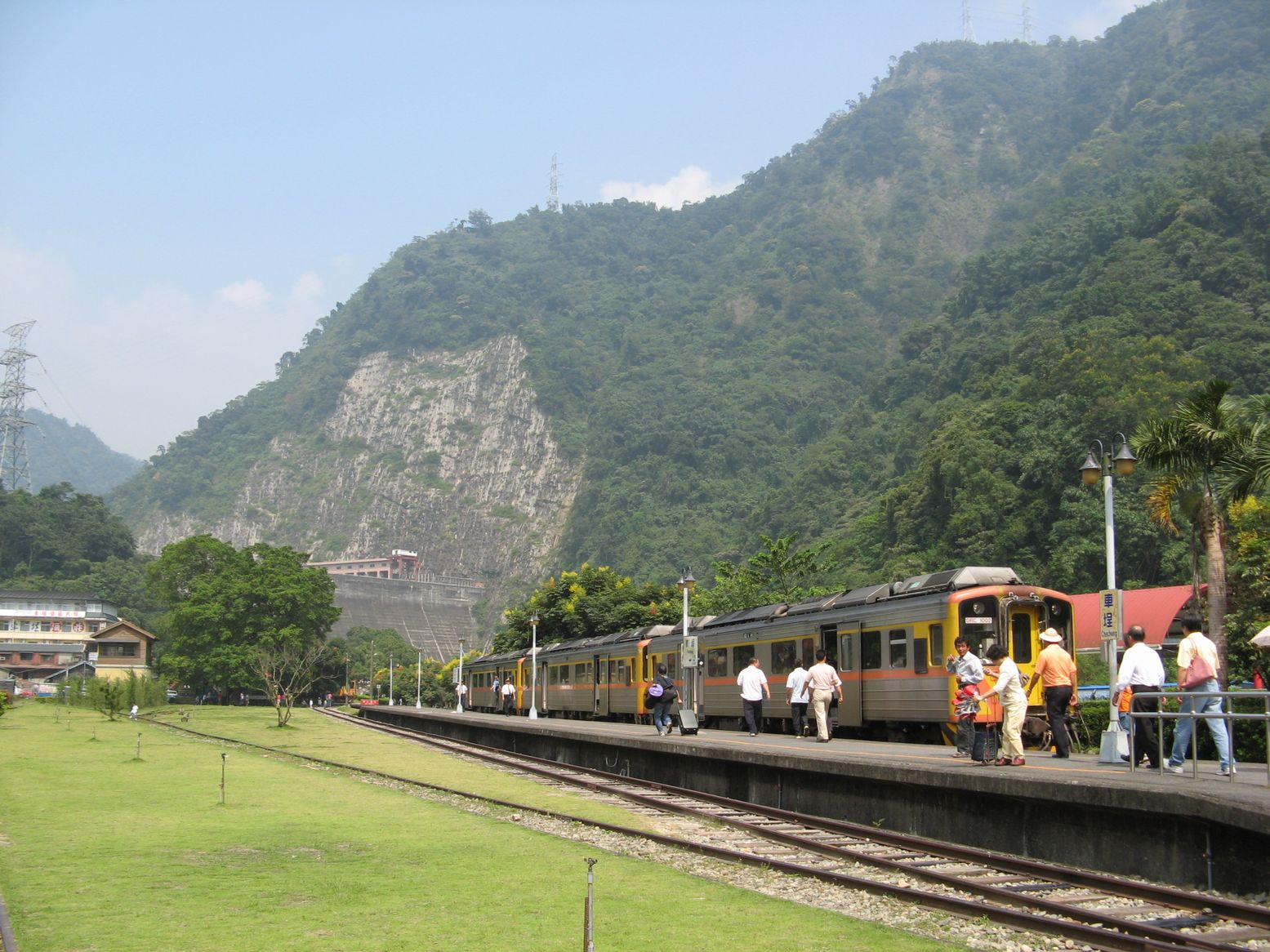 車テイ駅構内。